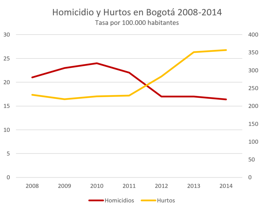 Tasas de Homicidios y Hurtos en Colombia en tasa por 100.000 habitantes. Muestra clara mejoría en homicidios, y desmejoría en hurtos. Fuente de datos